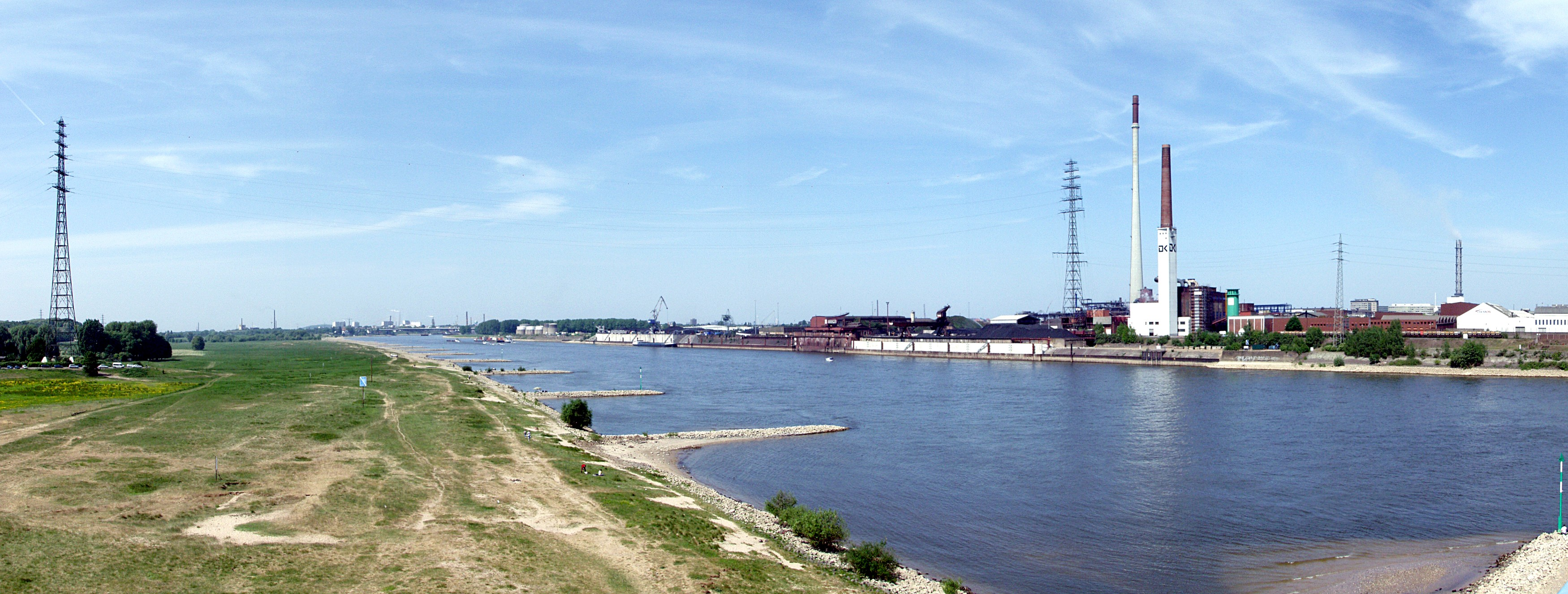 Niederrhein-Panorama von der Brücke der Solidarität bei Duisburg-Rheinhausen über den Rhein; Rhein-Freileitungskreuzung (110 kV, Bl. 2303)